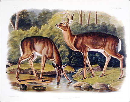 Zeichnung von John James Audubon aus The Viviparous Quadrupeds of North America